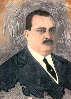 Retrato de Fabián Onsari